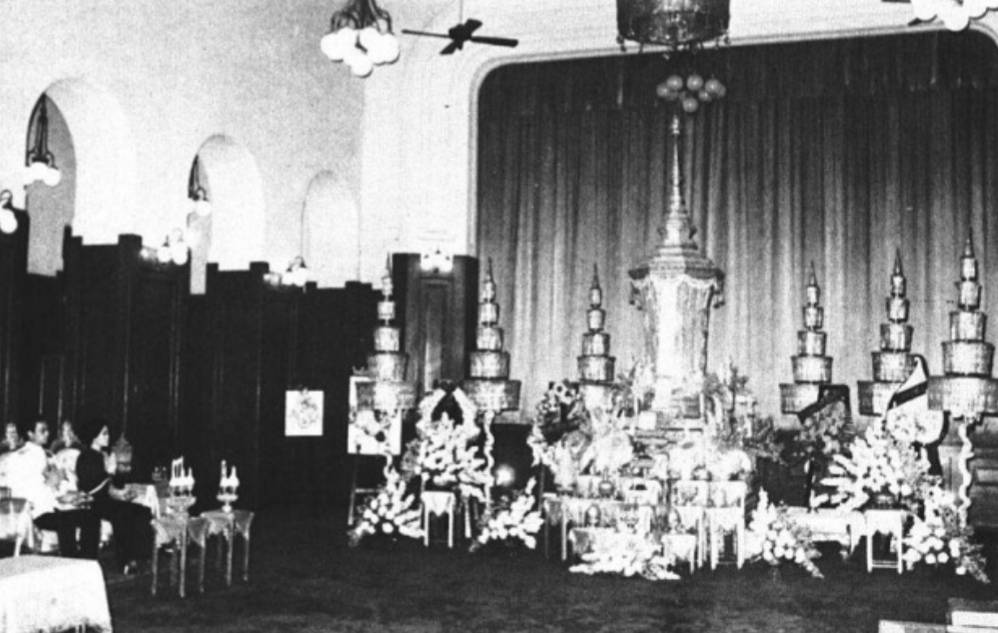 พระโกศทองน้อยทรงพระศพสมเด็จฯ ภายใต้ฉัตรตาดทอง 5 ชั้น